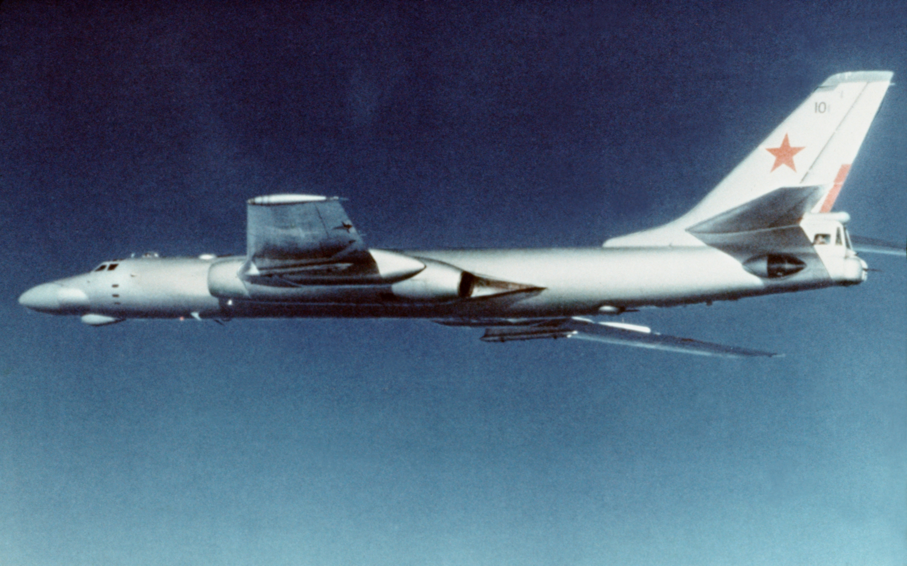 A Soviet Tu-16K-10-26 "Badger-C" in flight in 1984.